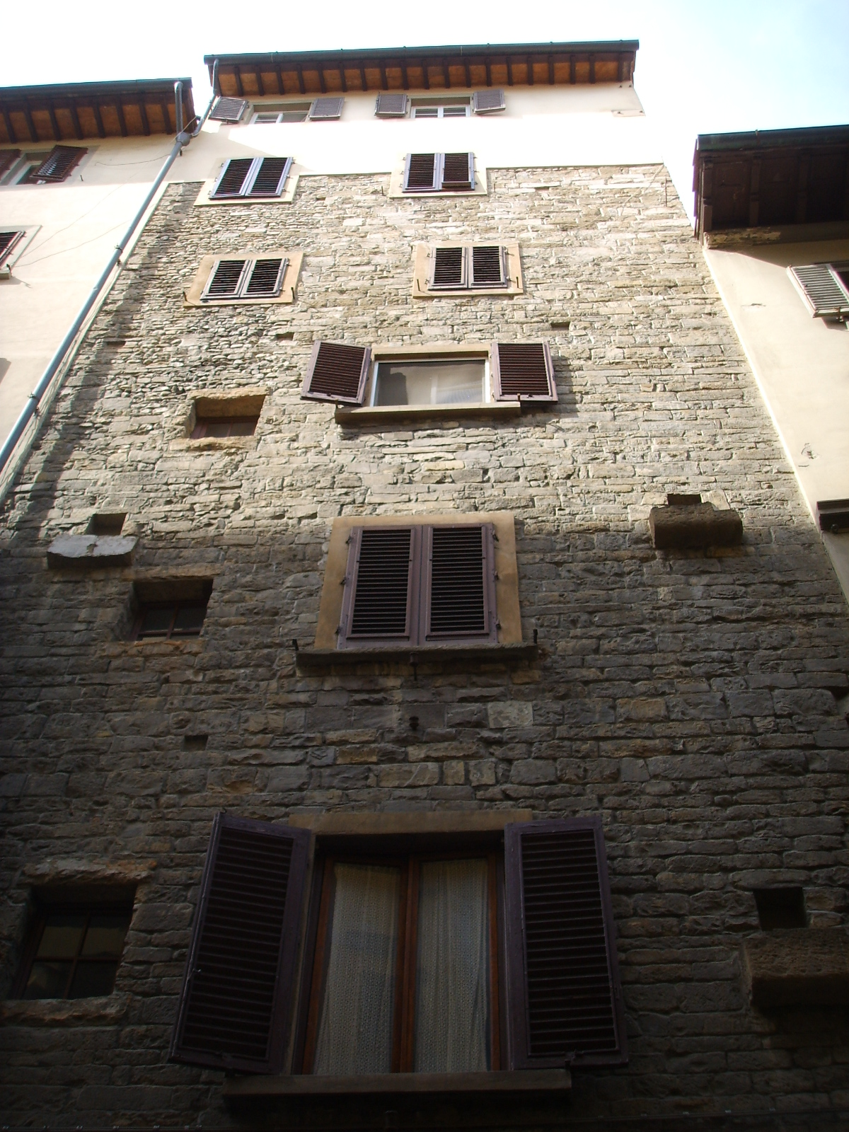 Torre dei Della Bella 02